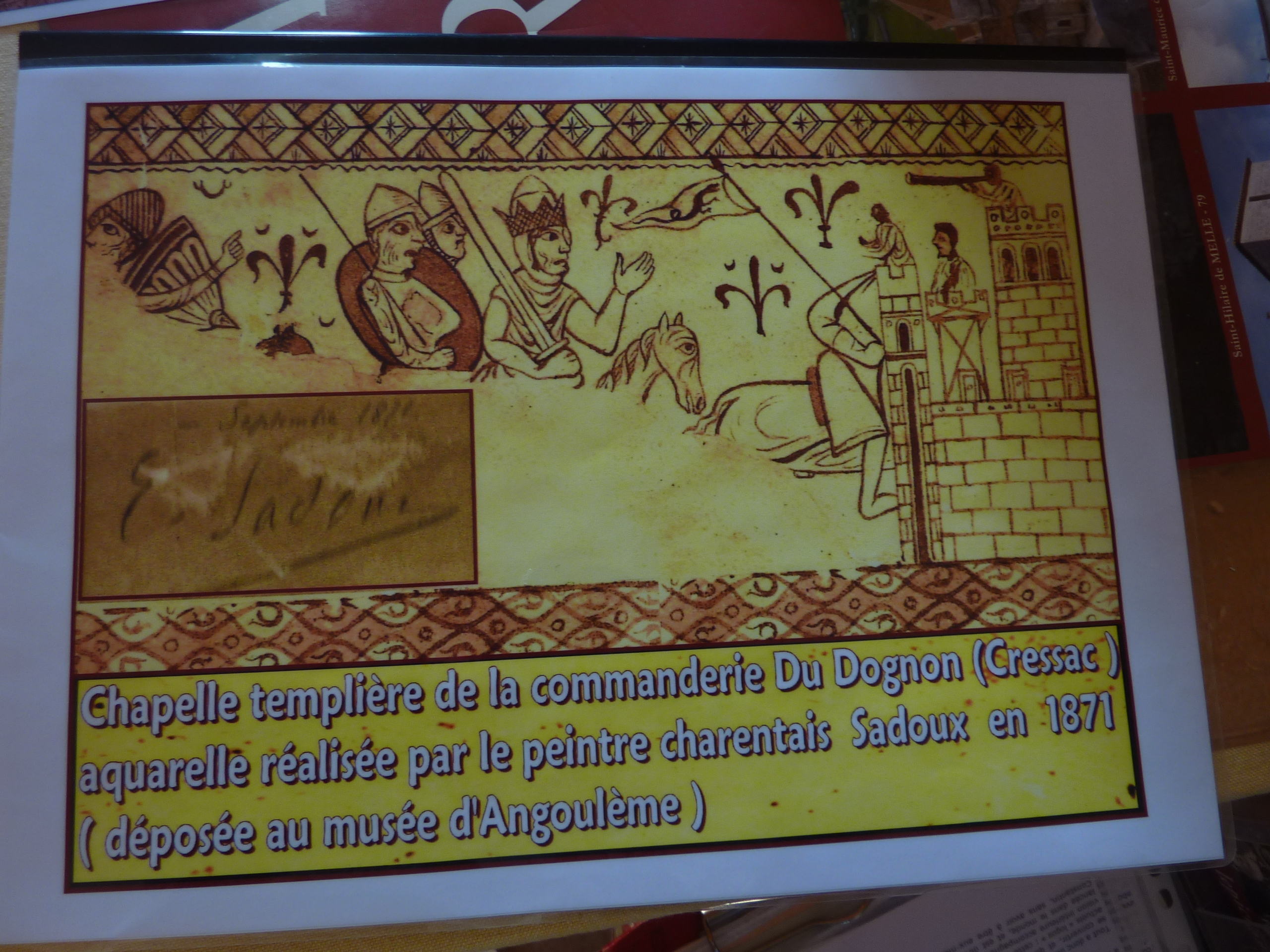 Photographie d'une photographie d'une aquarelle d'Eugène Sadoux représentant (en 1871) les fresques de la Commanderie de Cressac de Cressac